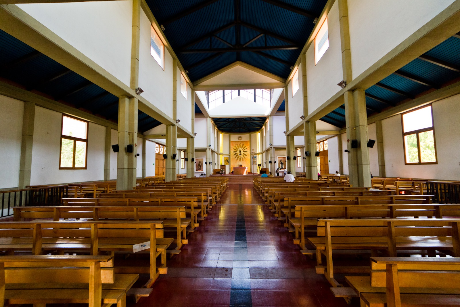 Santuario Auco-009